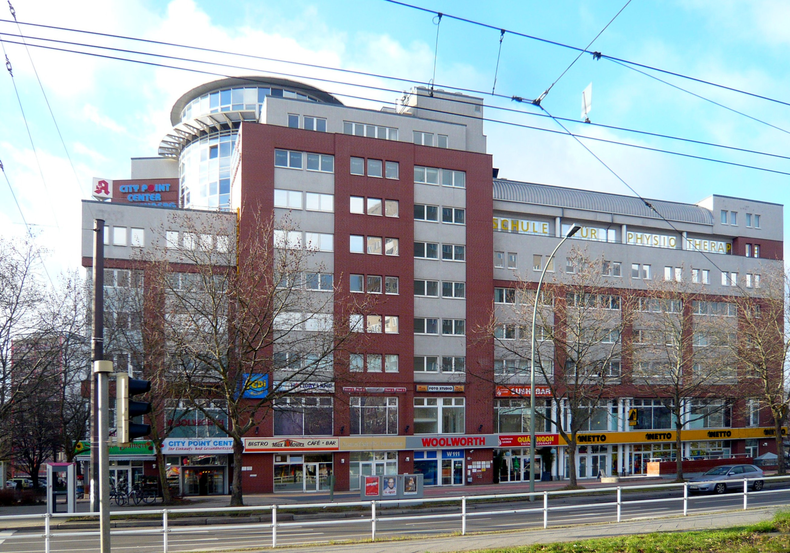 Bezirk Lichtenberg, CityPointCenter Nähe Roederplatz